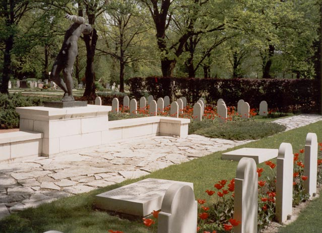 Niederländische Soldatengräber auf dem Salzburger Kommunalfriedhof, Salzburg, Österreich.